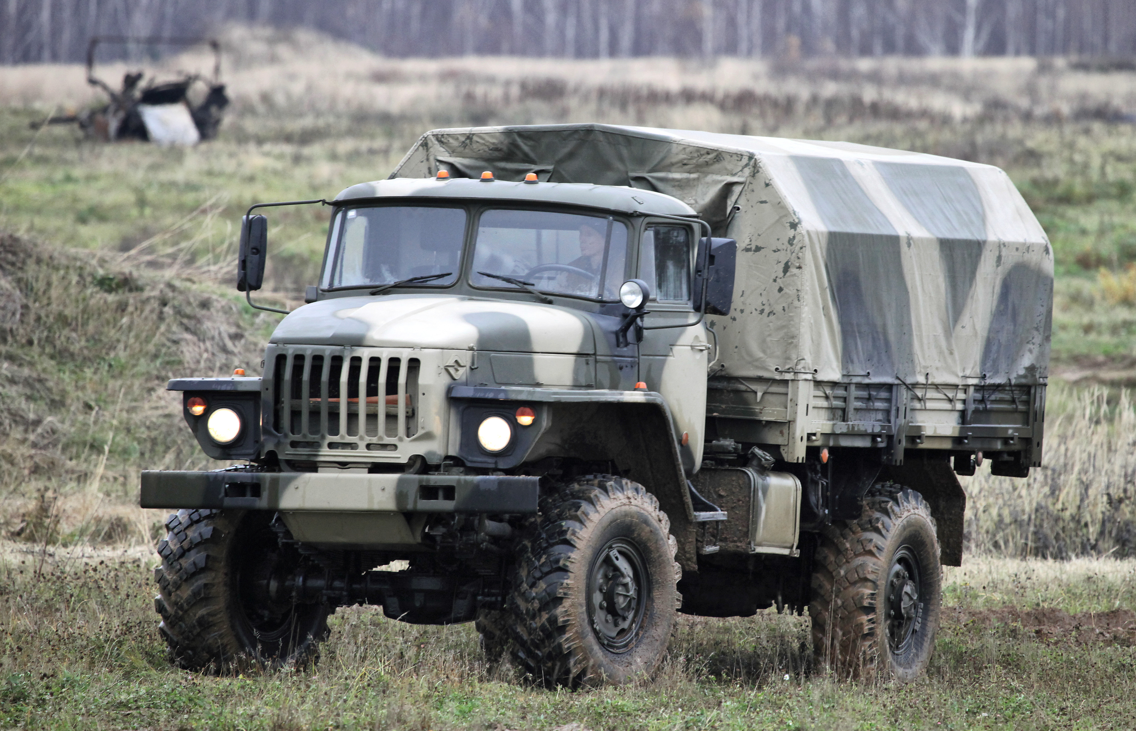 Урал-43206 (Ural-43206)